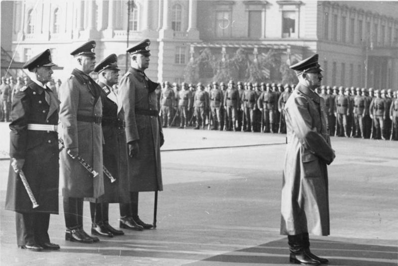 Berlin, Staatsakt für Admiral von Trotha Scherl: Der Führer beim Staatsakt für Admiral von Trotha. Hinter dem Führer Grossadmiral Dr. h.c. Raeder, Generalfeldmarschall Keitel, Generalfeldmarschall Milch und Generaloberst Fromm. 15.10.40 Presse-Hoffmann 9216-40 [Berlin, vor der Neuen Wache Unter den Linden] Abgebildete Personen: Hitler, Adolf: Reichskanzler, Deutschland Keitel, Wilhelm: Generalfeldmarschall, Ritterkreuz (RK), Heer, Deutschland (GND 118721577) Milch, Erhard: Generalfeldmarschall, Ritterkreuz (RK), Luftwaffe, Deutschland (GND 118582402) Fromm, Friedrich: Generaloberst, Ritterkreuz (RK), Heer, Deutschland (GND 118843338) Raeder, Erich: Großadmiral, Oberbefehlshaber der Kriegsmarine, Deutschland (GND 118743511) Trotha, Adolf von: Admiral, preußischer Staatsrat, Orden Pour le mérite, Deutschland (GND 11880278X)